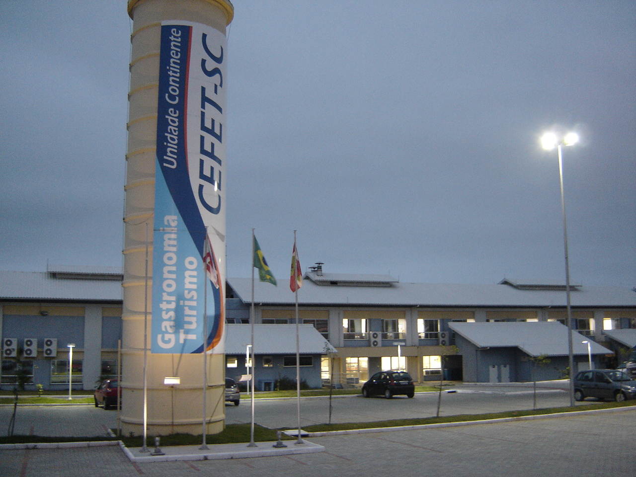 Fachada e totem da Unidade Continente do CEFET-SC, no bairro Coqueiros, em Florianópolis (SC), Brasil.